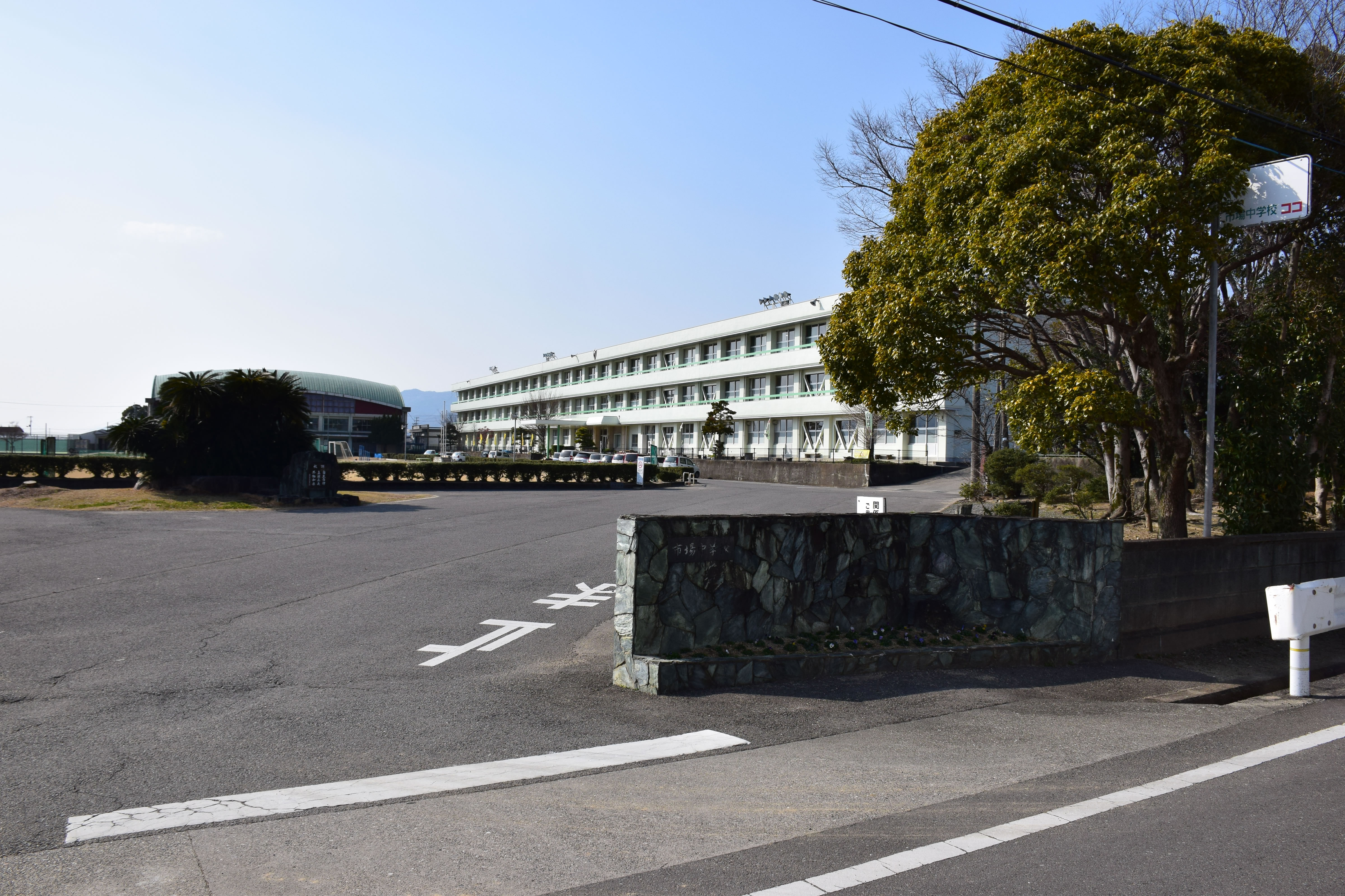 阿波市立市場中学校